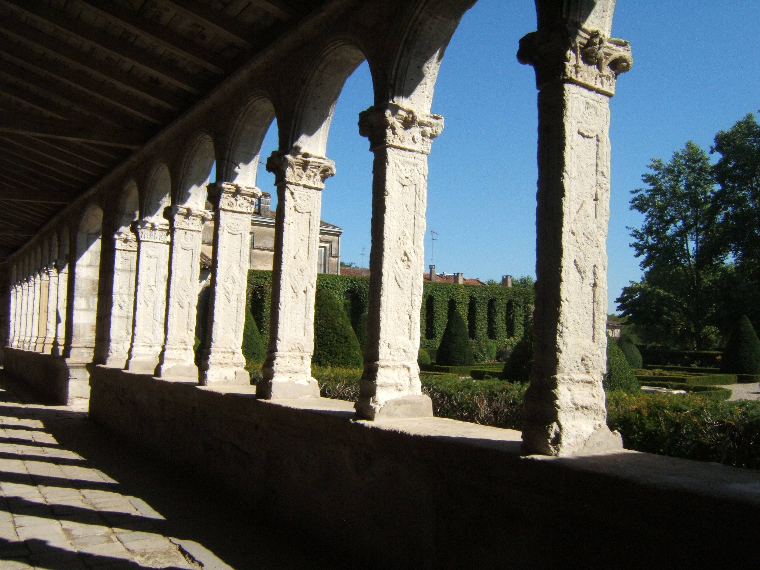 Le Cloitre de Notre Dame de Marmande.